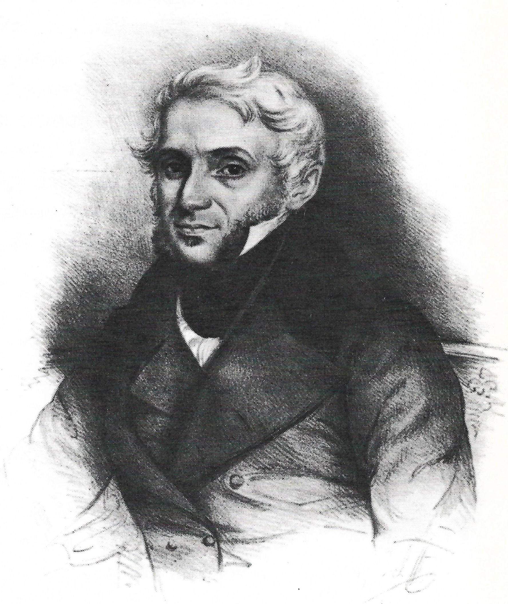 Luís António de Abreu e Lima, Conde da Carreira (1835), da autoria de P.C. van Geel